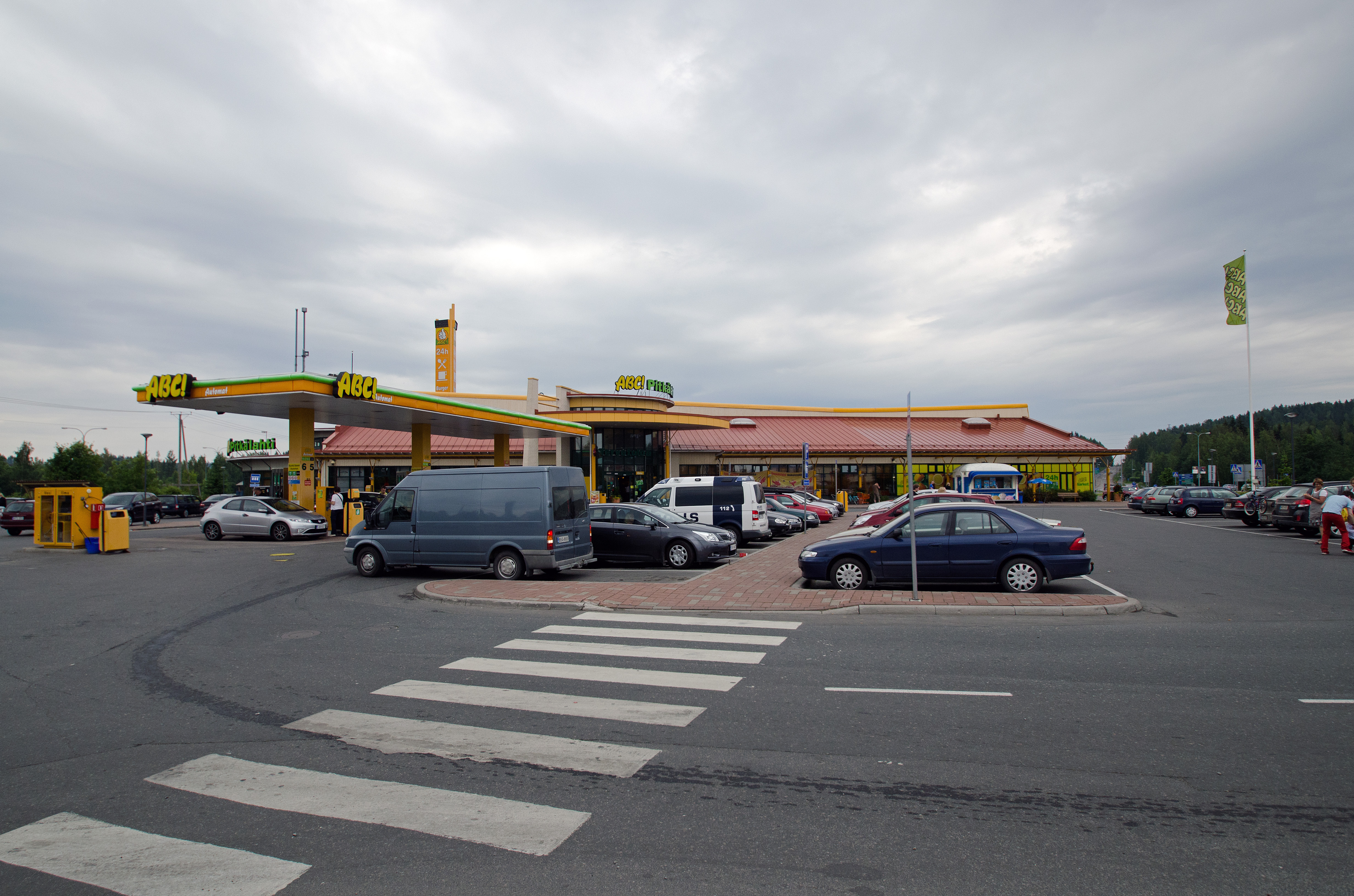 Куопио